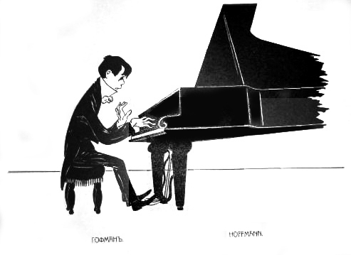 Американский пианист Иосиф Гофман на карикатуре Поля Робера из альбома «Весь Петербург в карикатурах»